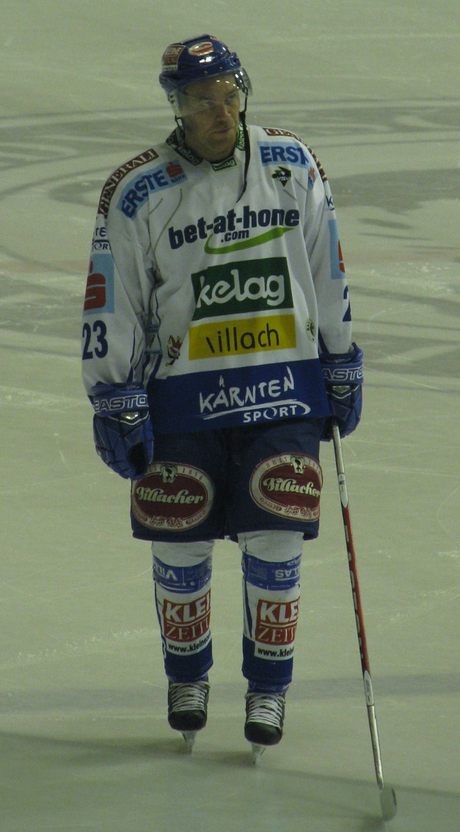 Mikael Wahlberg 271009.jpg